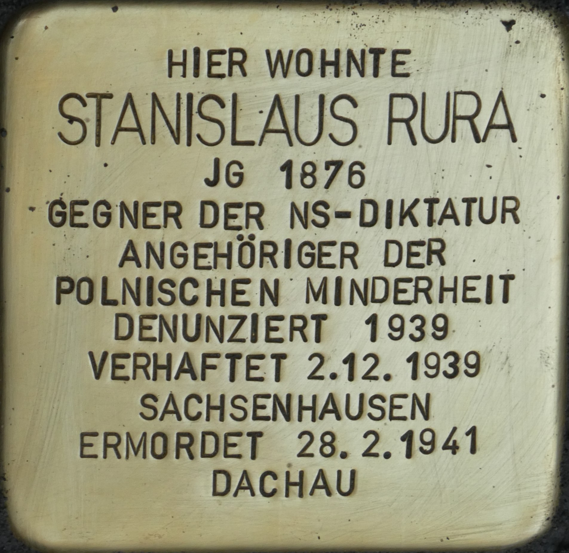 Stolperstein für Stanislaus Rura, Lünen-Brambauer, 28.10.2018